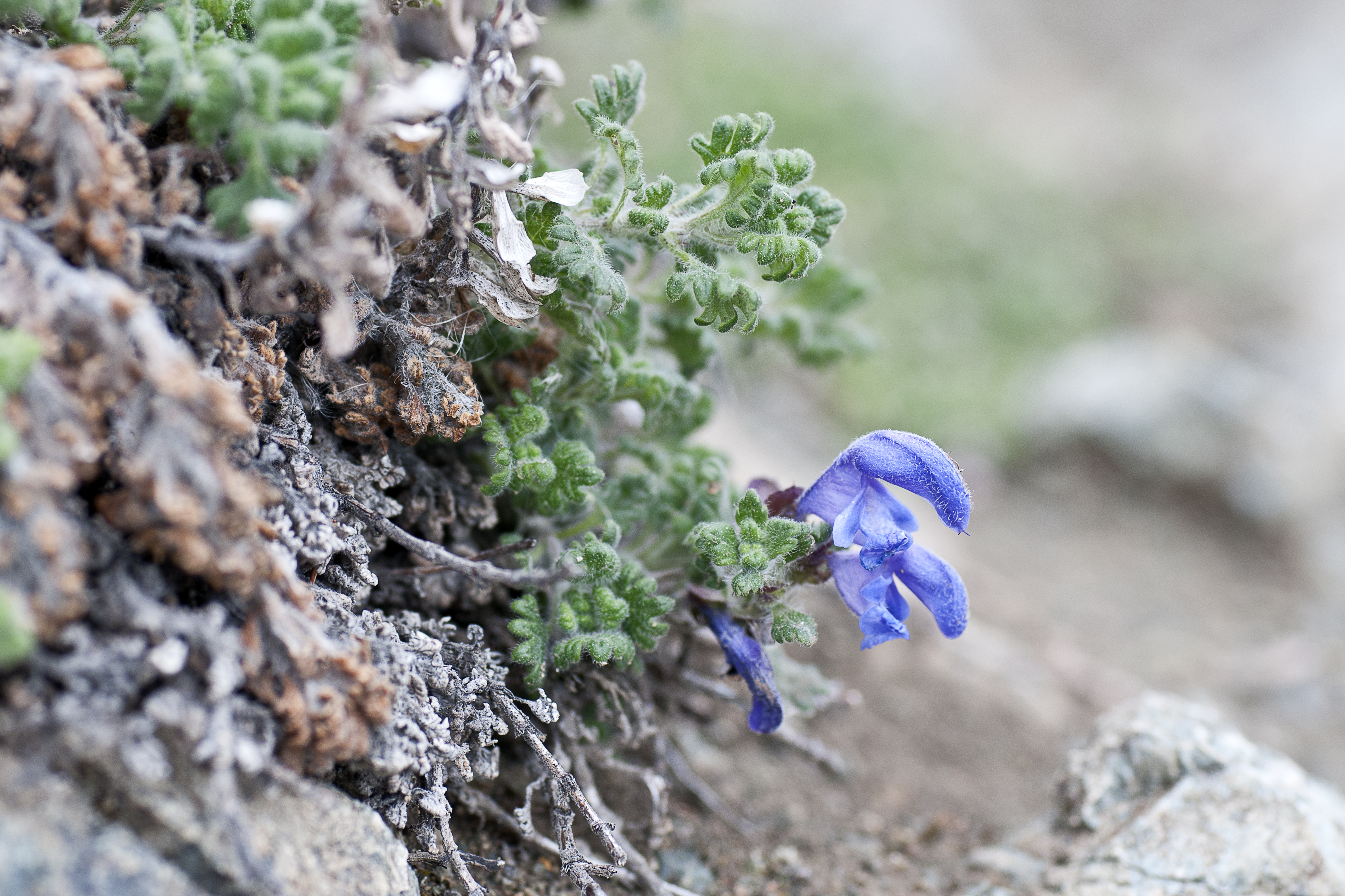 Dracocephalum palmatum an einem extrazonalen Steppenhang in Chersky an der unteren Kolyma, Republik Sakha (Jakutien)